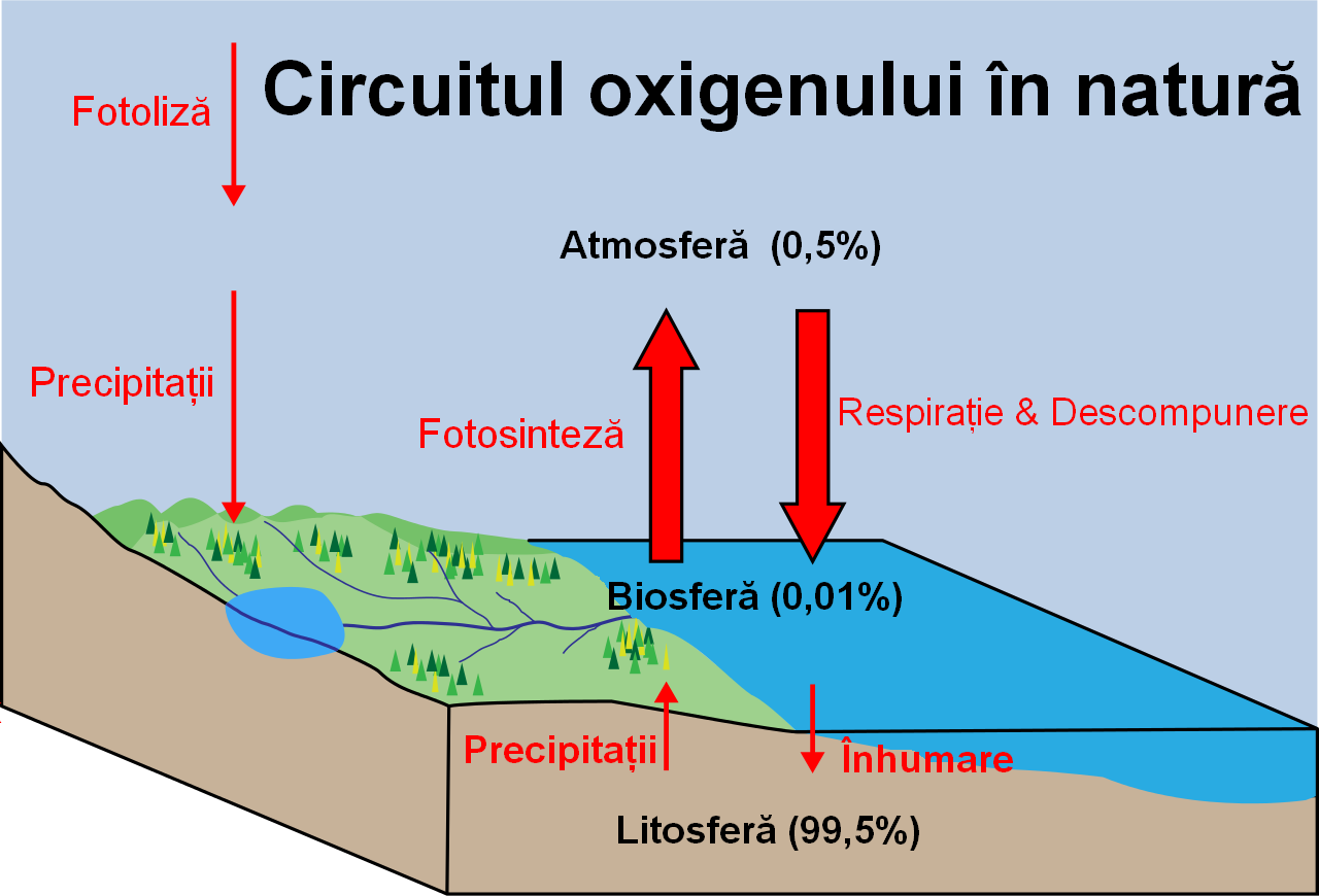 Oxygen cycle